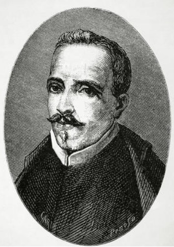 Retrato de fantasía al Inca Garcilaso de la Vega, grabado por Carlos Penoso